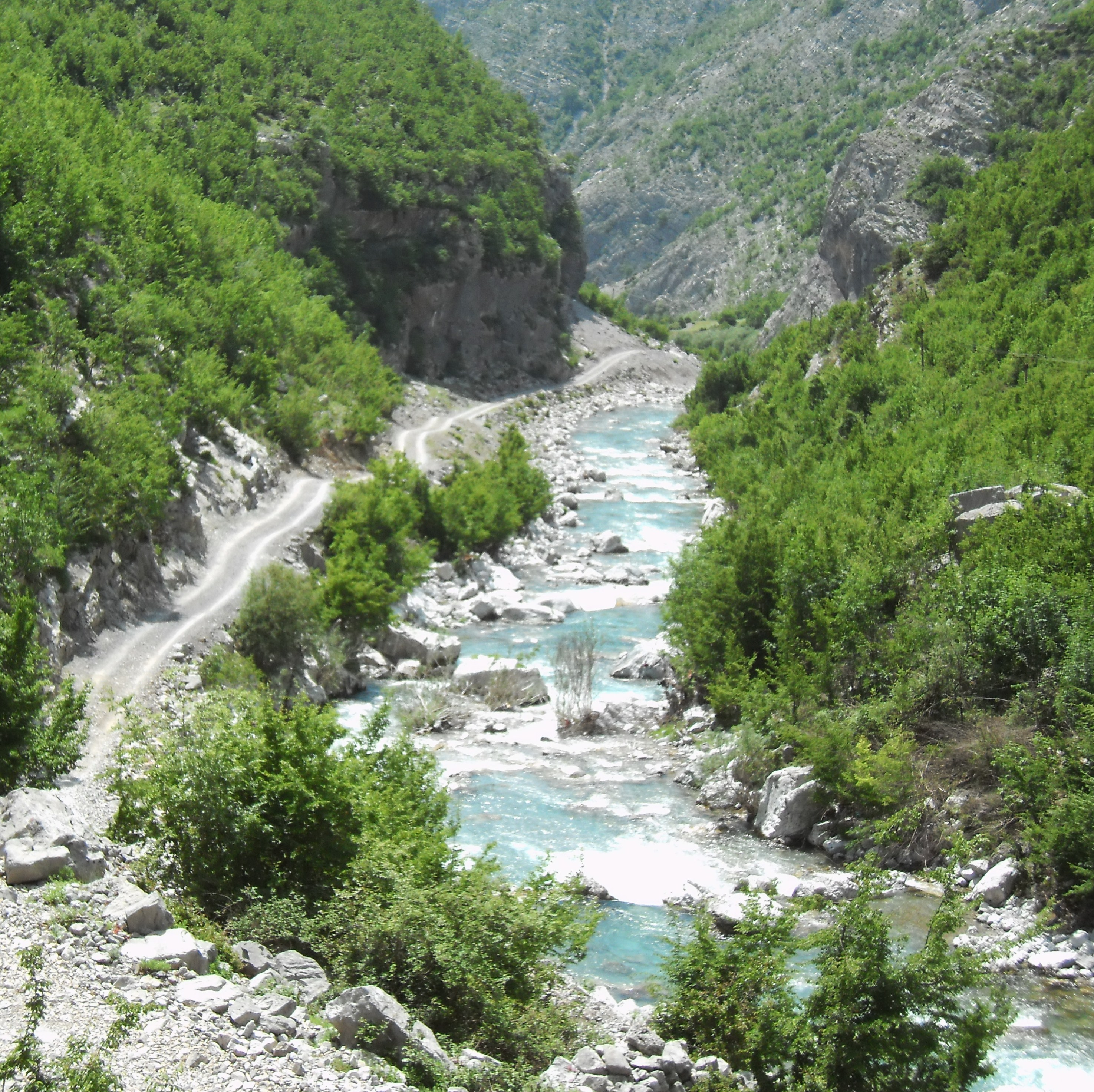 Straßen- und Gebirgsansicht in der Region Kelmend, Albanien; Straße von Tamara nach Nikç